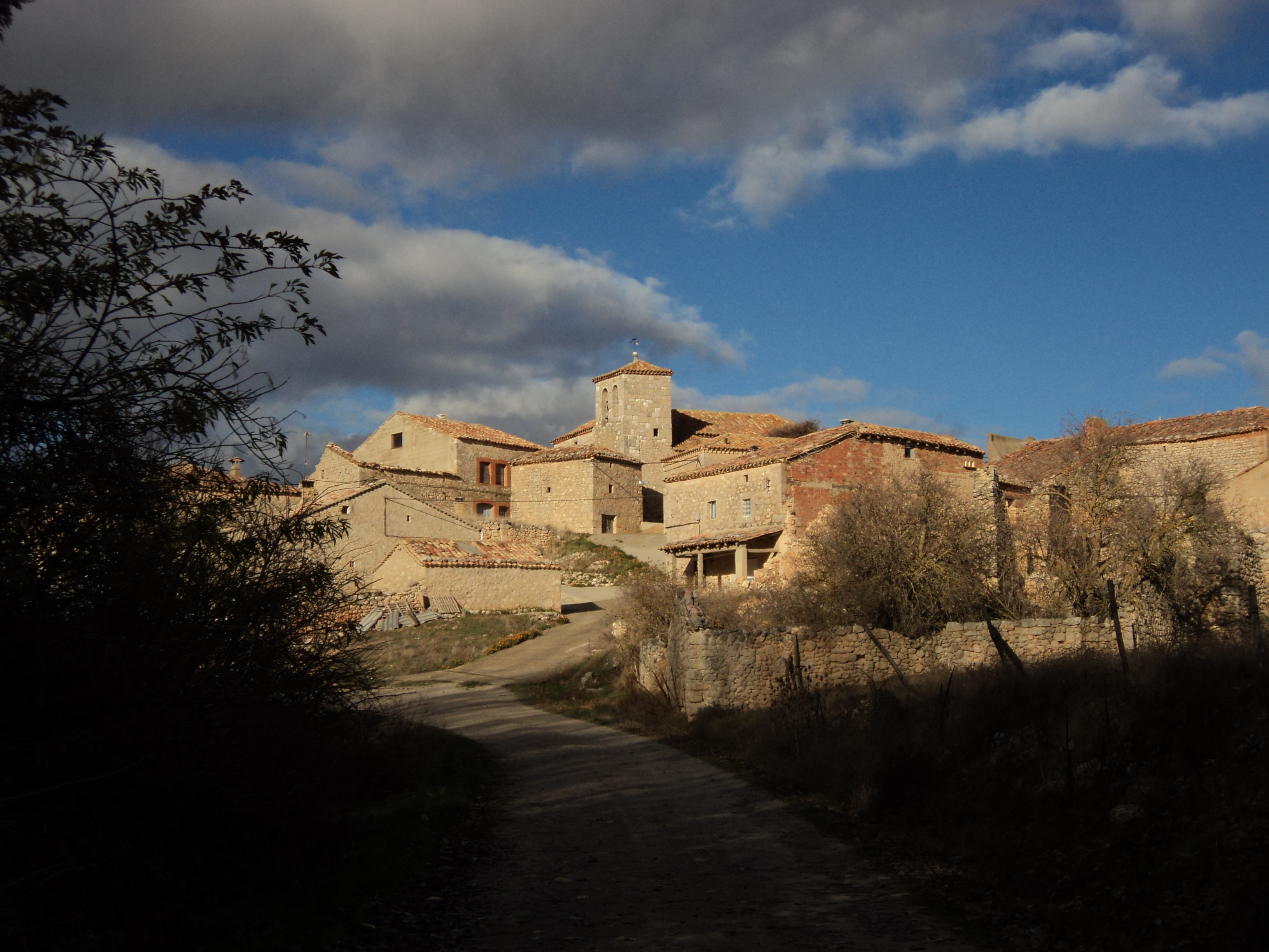 Perspectiva de la Iglesia de San Pedro y algunas casas del pueblo.